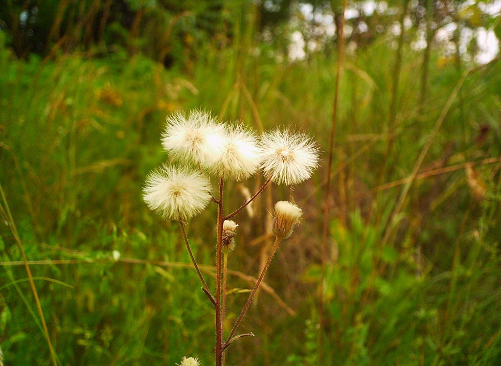 Erigeron acer, Asteraceae